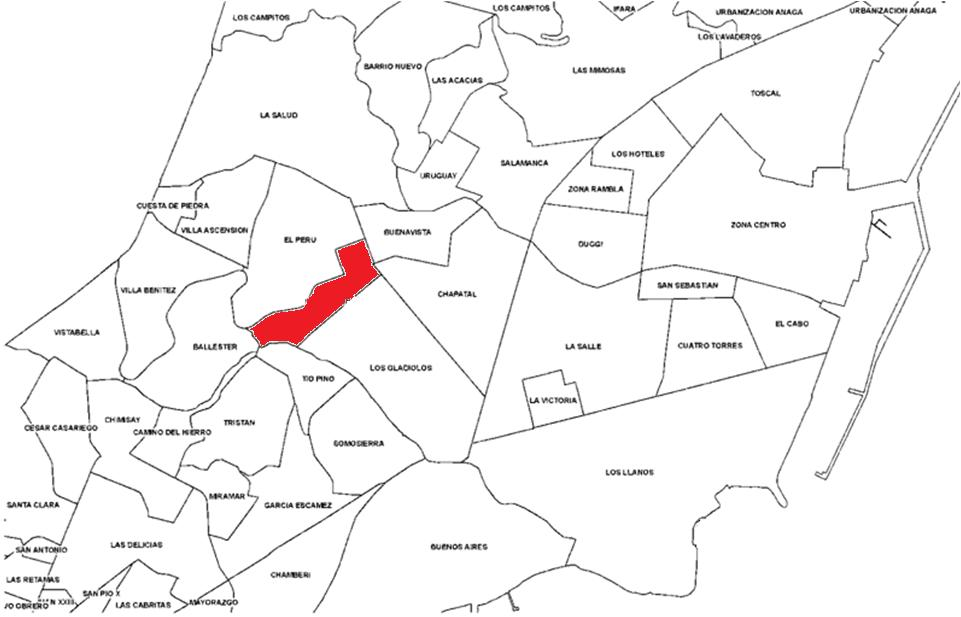 Localización del barrio de Cruz del Señor